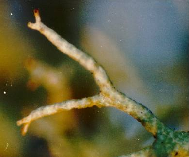 Cladonia subtenuis